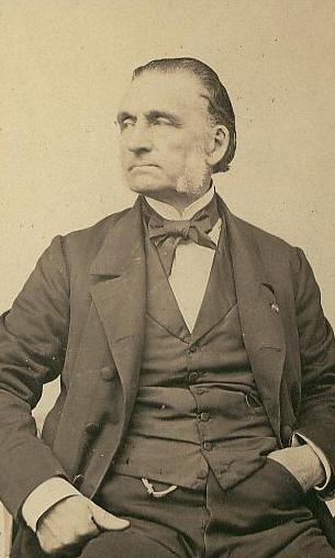 Description photographie d'Armand Trousseau prise par Pierre Petit Datephoto insérée le 8 février 2010Sourcesource personnelle au propriétaire de la photographieAuthorAtelier photographie de Pierre Petit, document scanné par Franck DevedjianPermission (Reusing this file) Oeuvre tombée dans le domaine public photographie d'Armand Trousseau prise par Pierre Petit